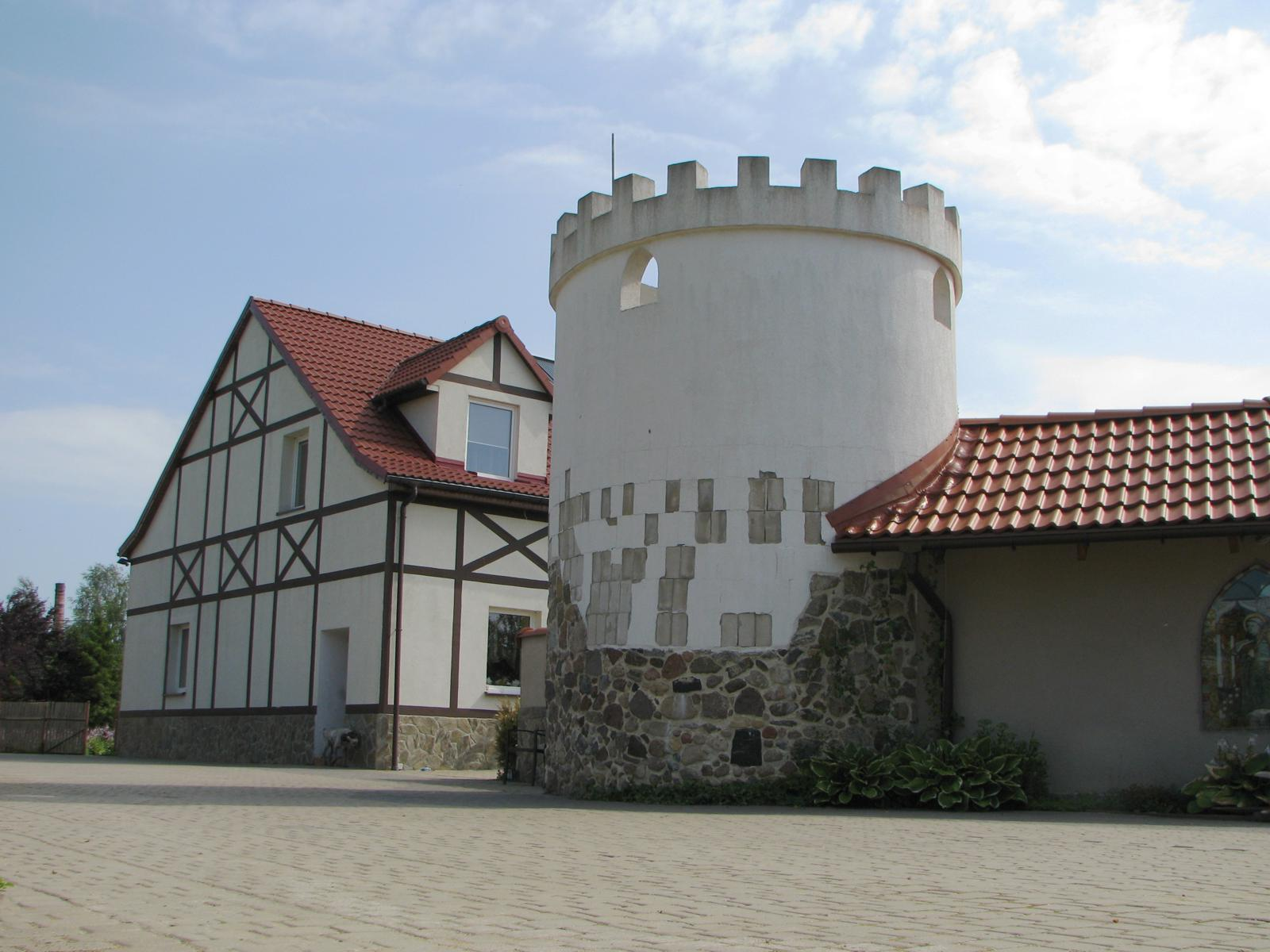 Wojcieszyce. Gospodarstwo agroturystyczne E. Krystkiewicza